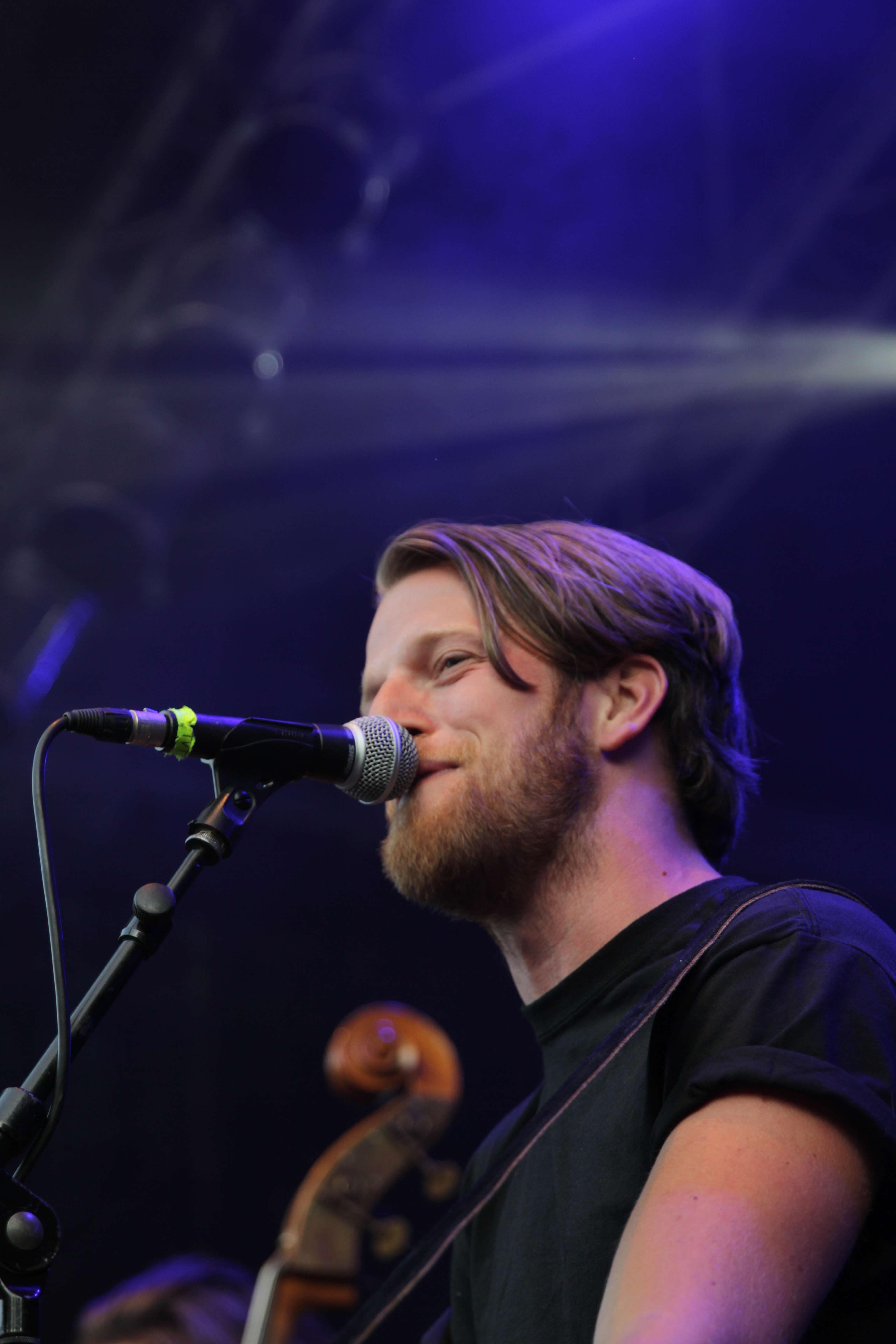 Tim Vantol auf dem Rock Camp 2014.